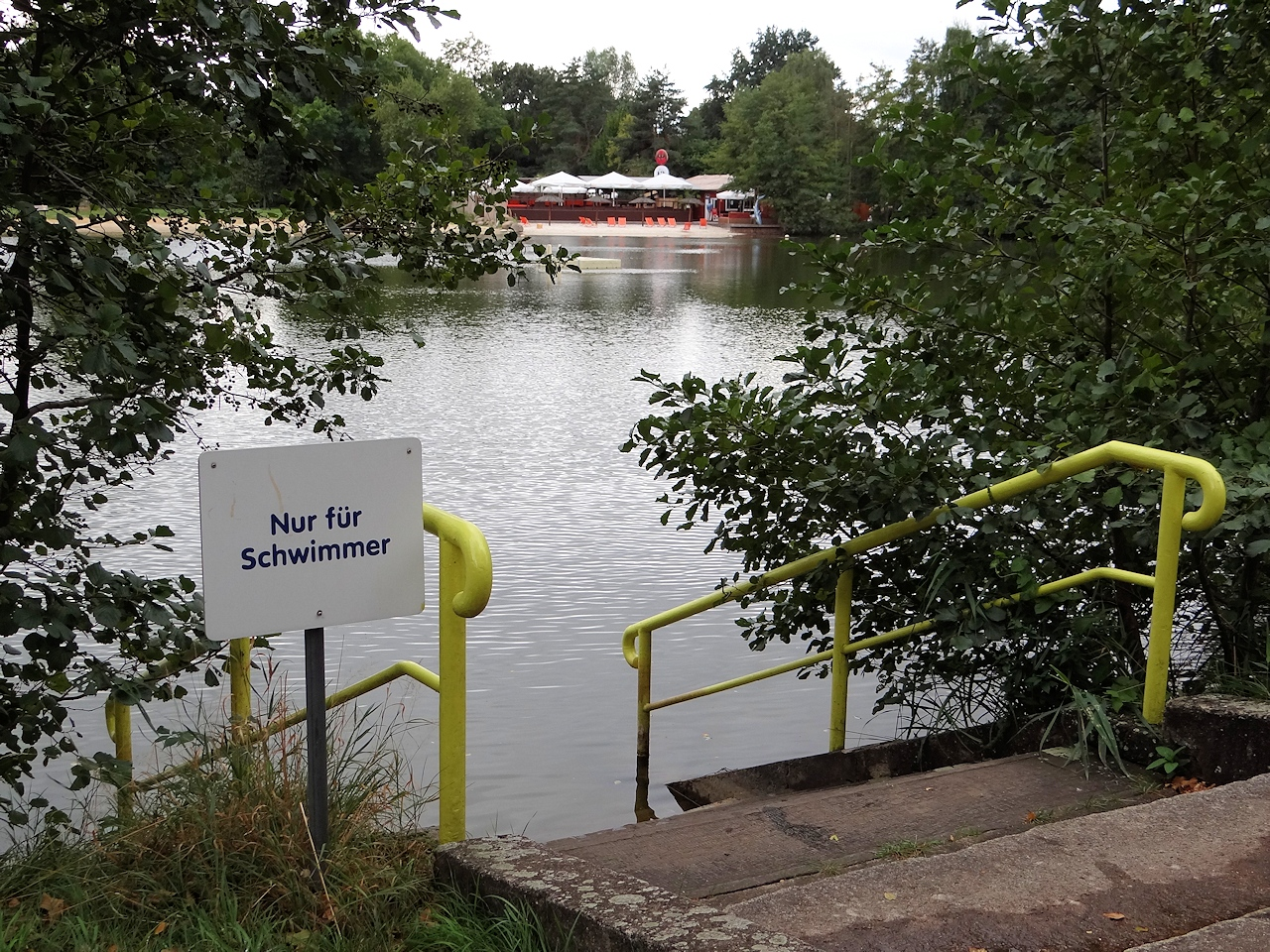 Kennelbad Braunschweig, Badeinstieg "Nur für Schwimmer" am Nordrand des Badesees mit Blick auf die Strandbar.